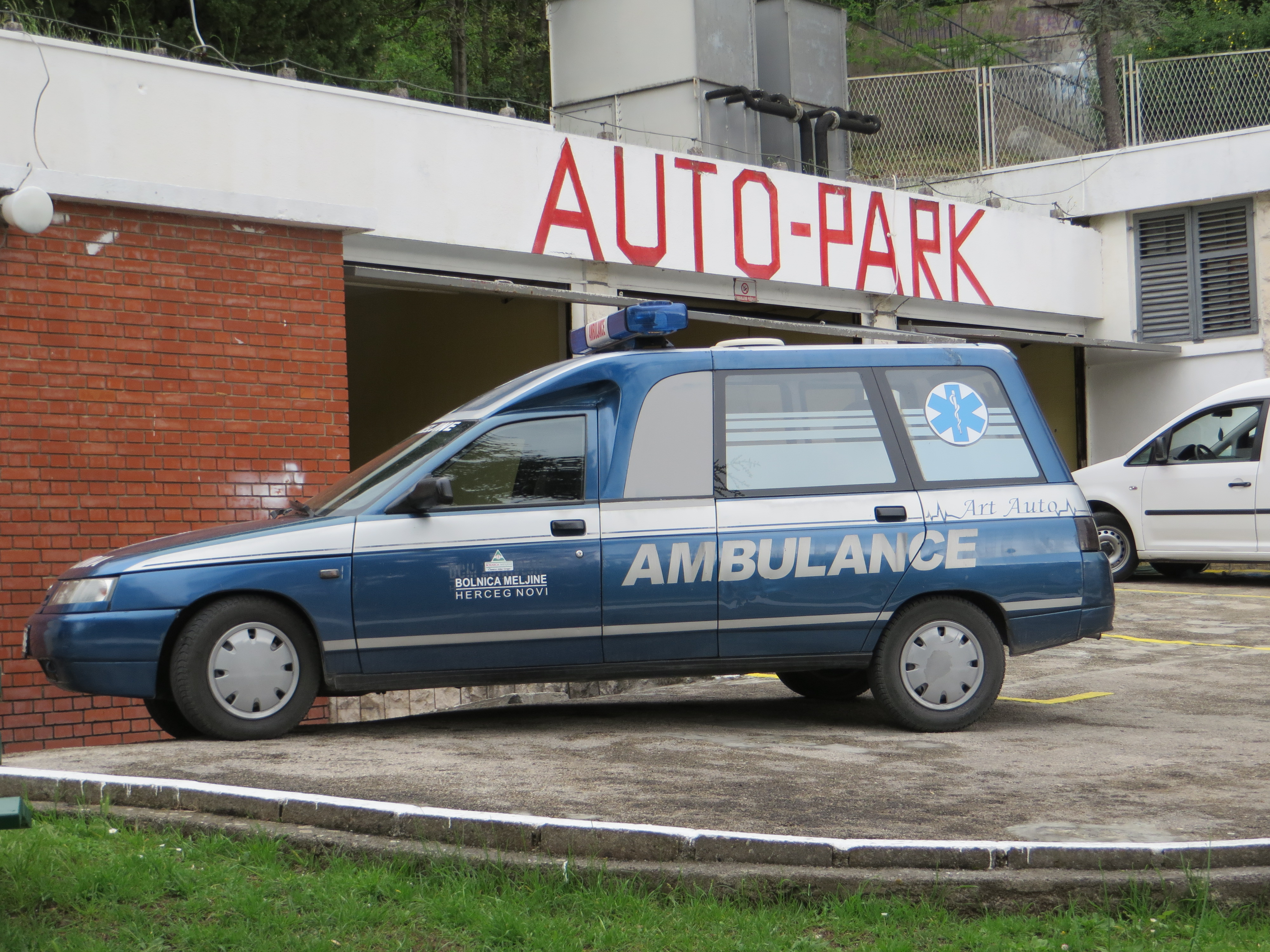 Ambulance in Montenegro